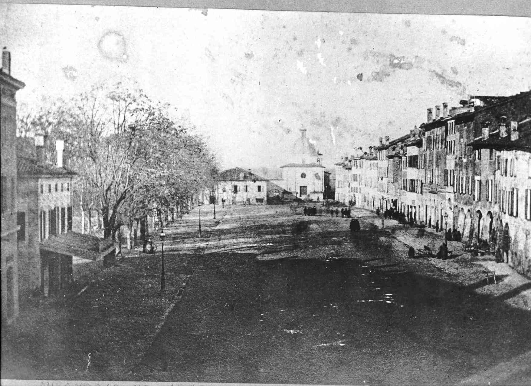 Piazza Vittorio Emanuele (oggi piazza della Costituente) a Mirandola verso il 1880